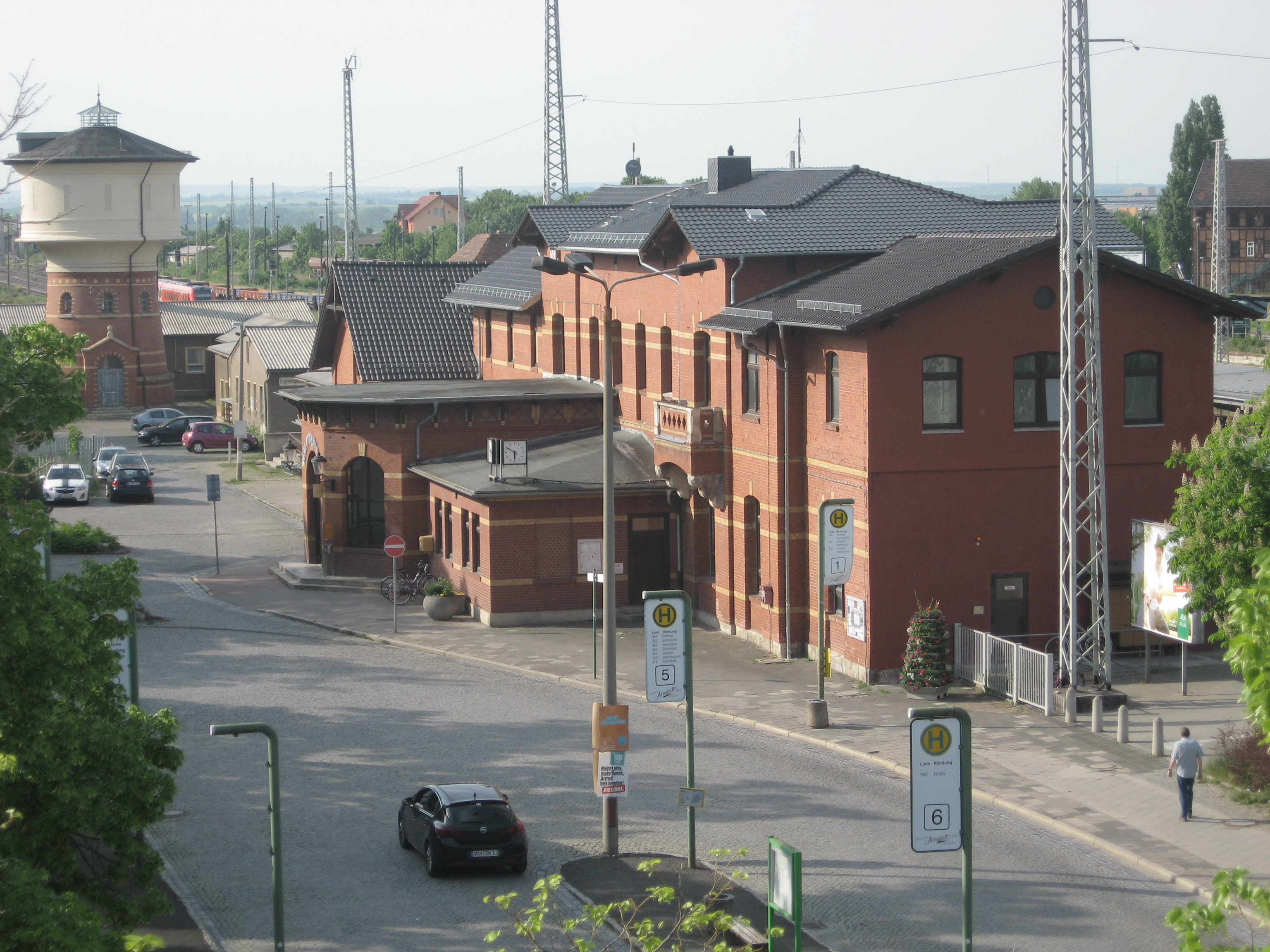 Hauptbahnhof in Arnstadt, links Wasserturm.